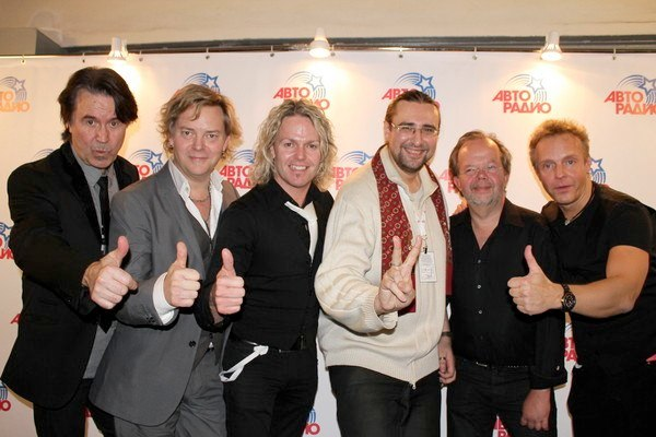 Группа Secret Service и журналист "Нового Взгляда" Василий Козлов